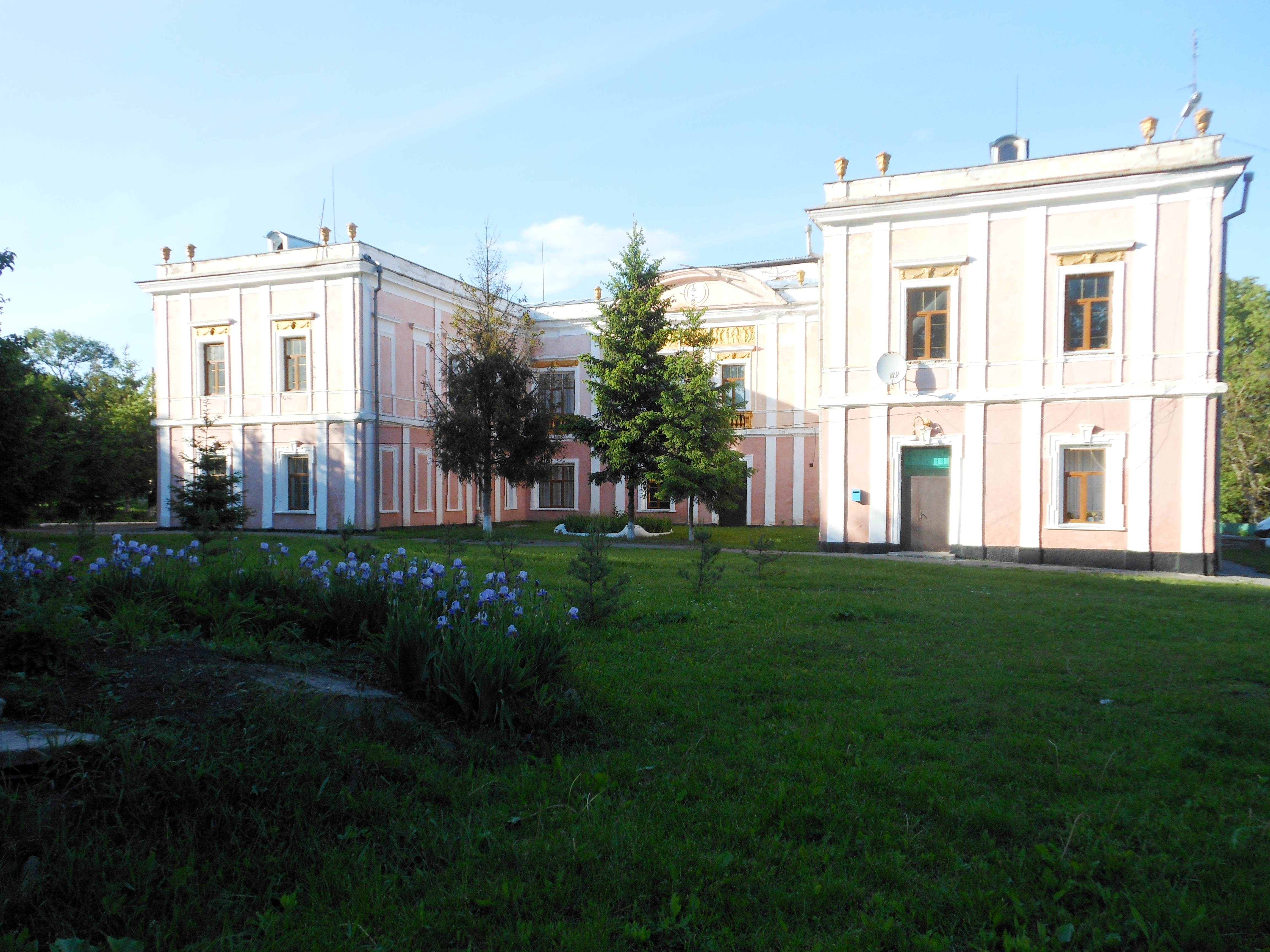 Садиба С. Ценіної, Котюжани, вул.Червоноармійська, 12